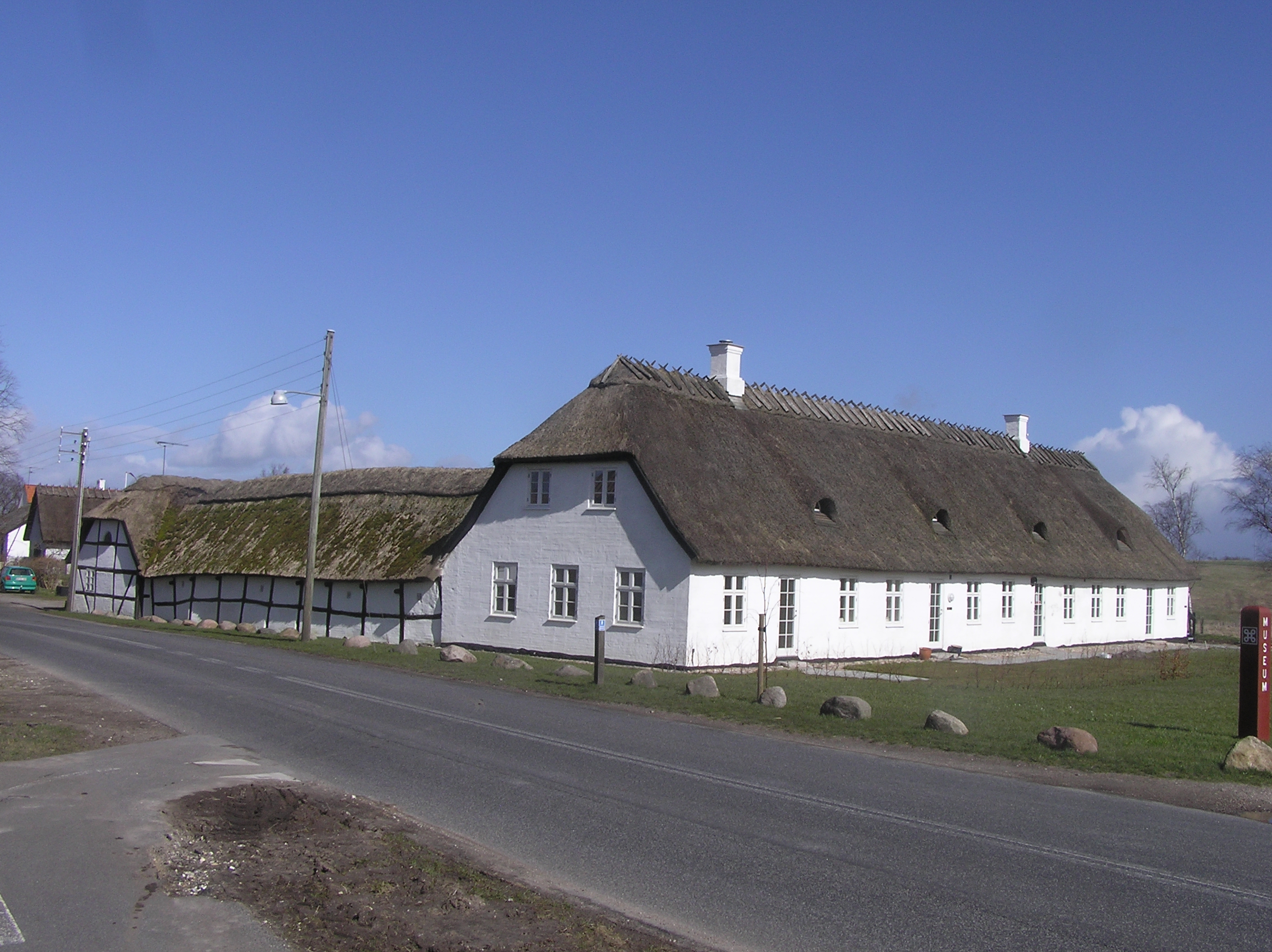 Danmark Sjælland Gammel Lejre:Hestebjerggaard